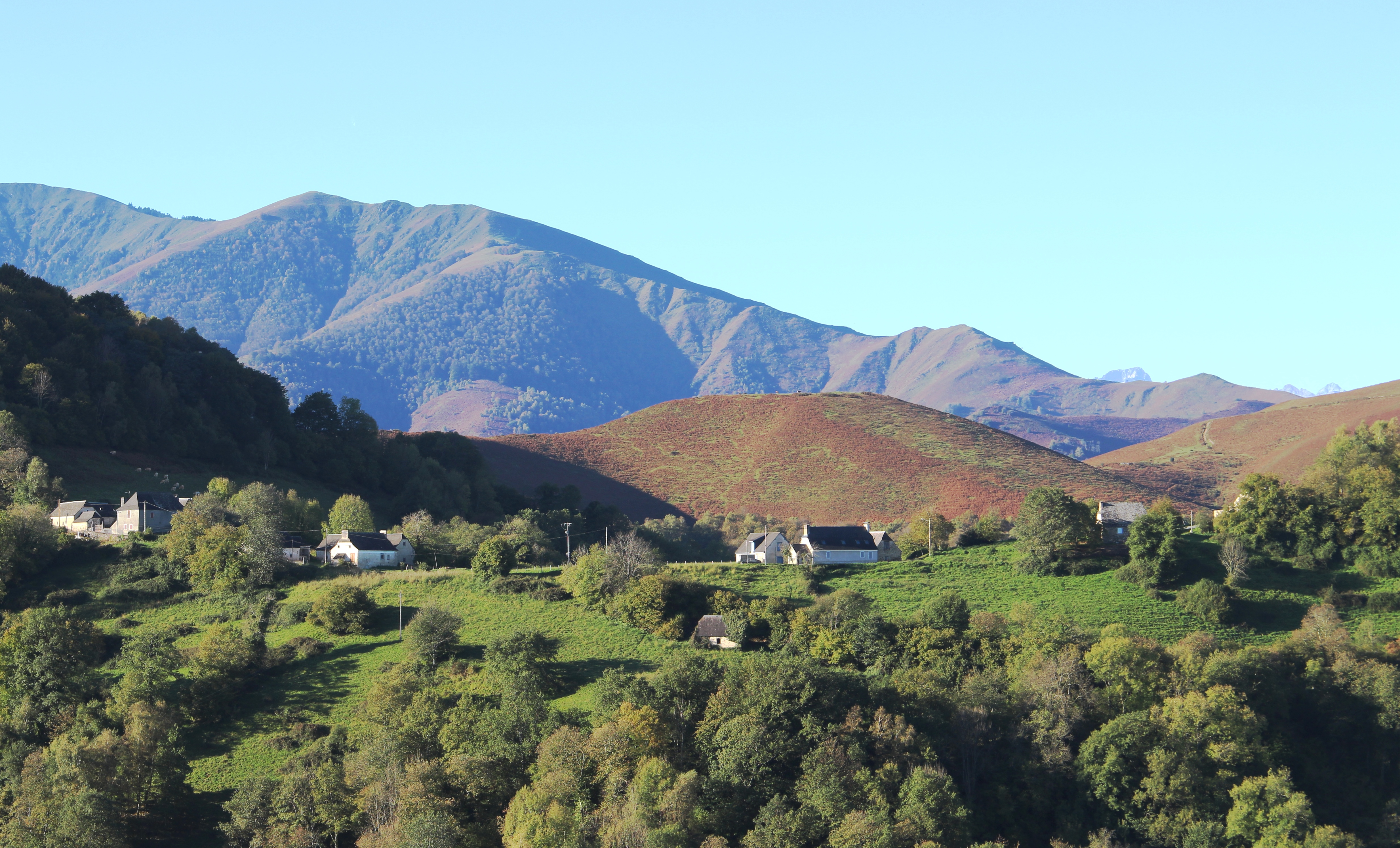 Sère-Lanso (Hautes-Pyrénées)